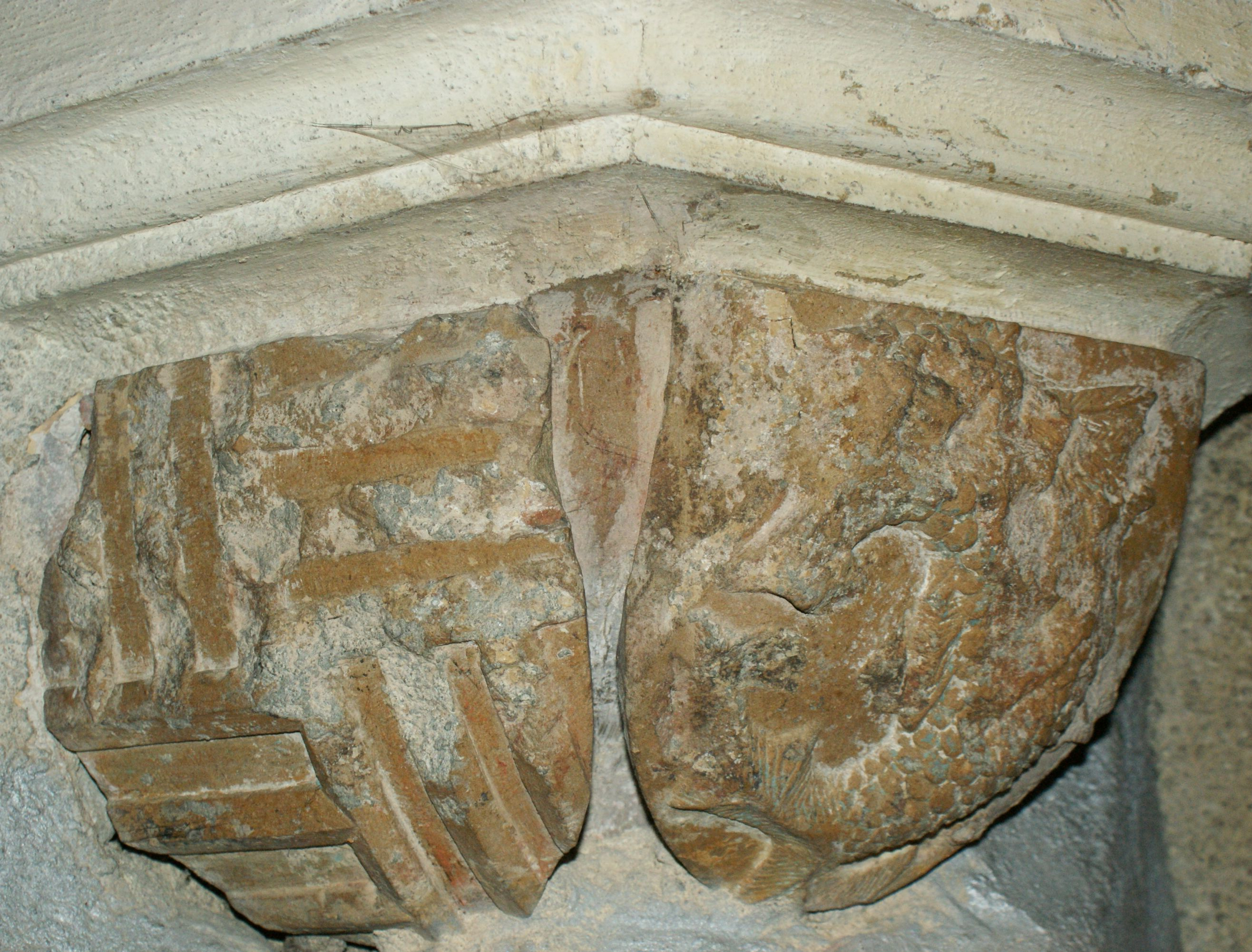 Chapiteau de l'église de Jaligny (Allier - France) On distingue les armes de Dauphins d'Auvergne. L'autre écu n'est pas identifié.